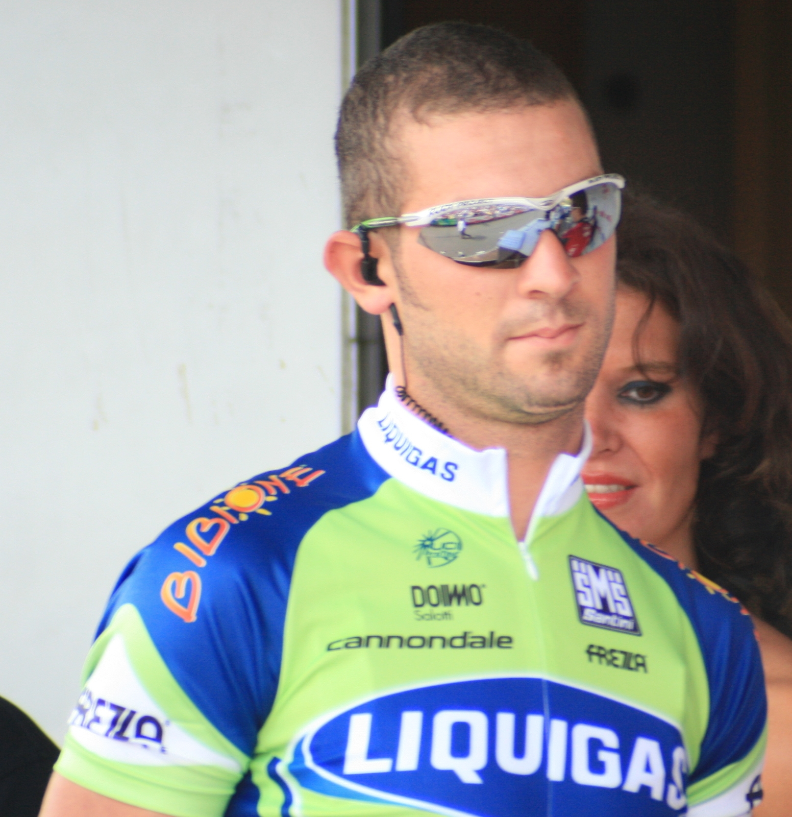 Alberto Curtolo, à l'Eneco Tour 2008, à Ardooie